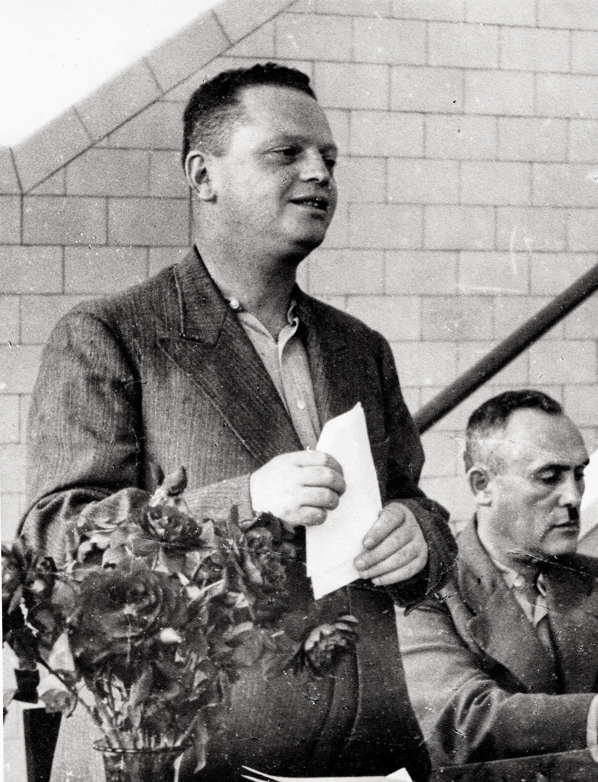 זאב און מנהל תנובה חיפה. טקס פתיחת המחלבה. 7.1.1939 חיפה